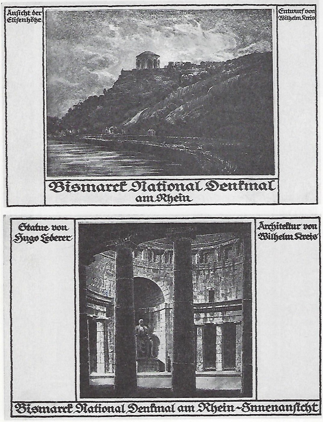 Offizielle Postkarten des Vereins zur Errichtung des Bismarck-National-Denkmals auf der Elisenhöhe bei Bingerbrück am Rhein. Auf der Rückseite ist vermerkt: „Dieser Gruß ein Baustein zun Bismarck-National-Denkmal“.